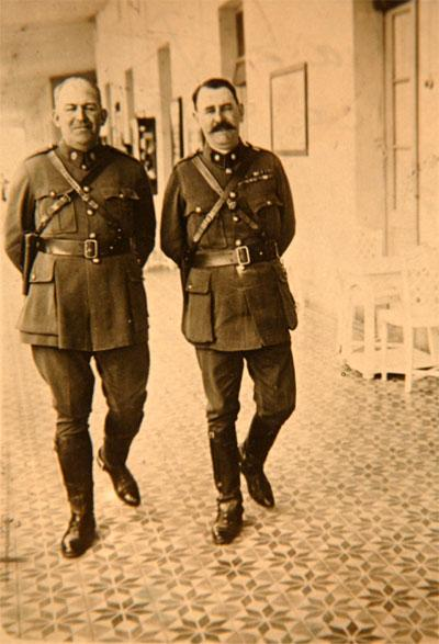 Ex presidente José Félix Uriburu, dictador iniciador de la Década Infame. A su lado, el futuro Presidente Agustín Pedro Justo